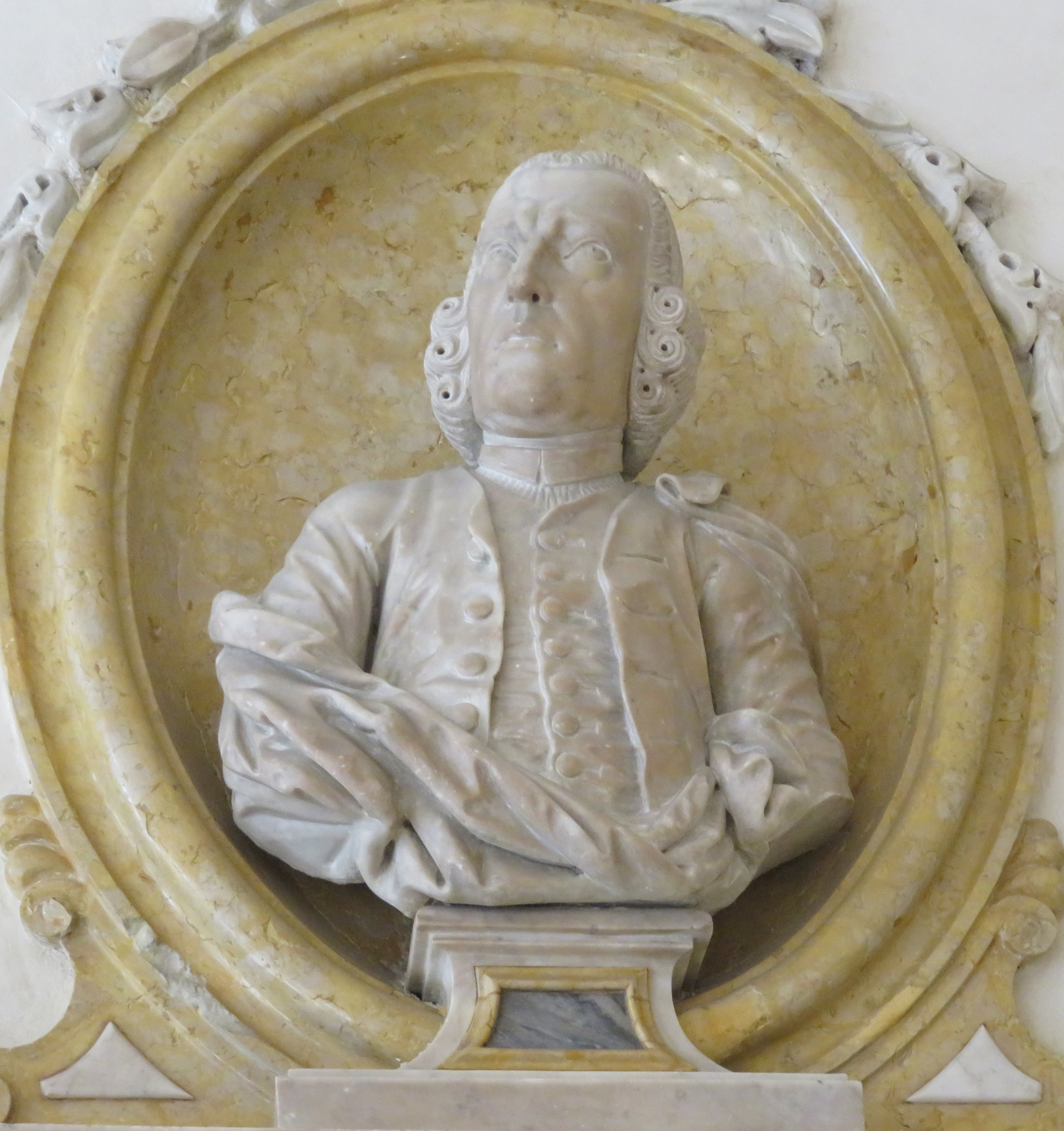 Monumento a Girolamo Tartarotti, opera di Francesco Tomezzoli. Atrio del Palazzo dell’Istruzione (o Palazzo Piomarta) Rovereto